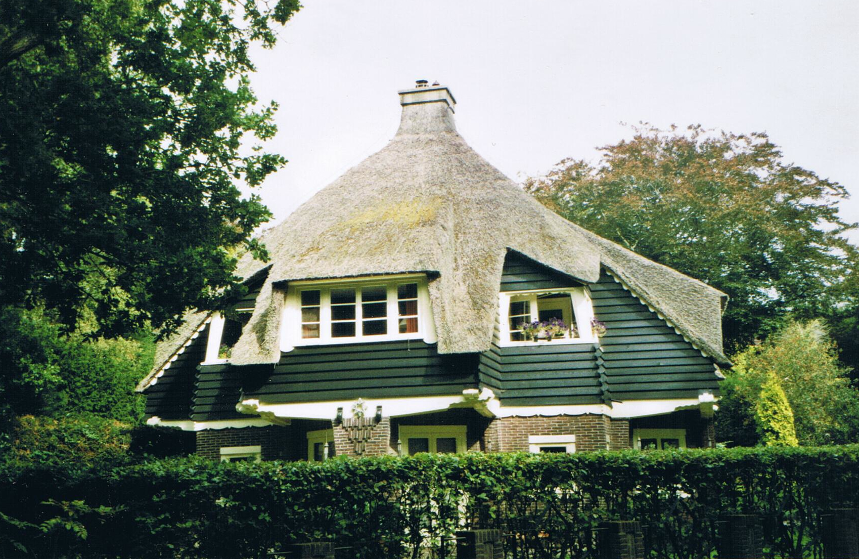 Bergen (NH), Park Meerwijk, Landhuis Meerhoek (C.J.Blaauw, 1918